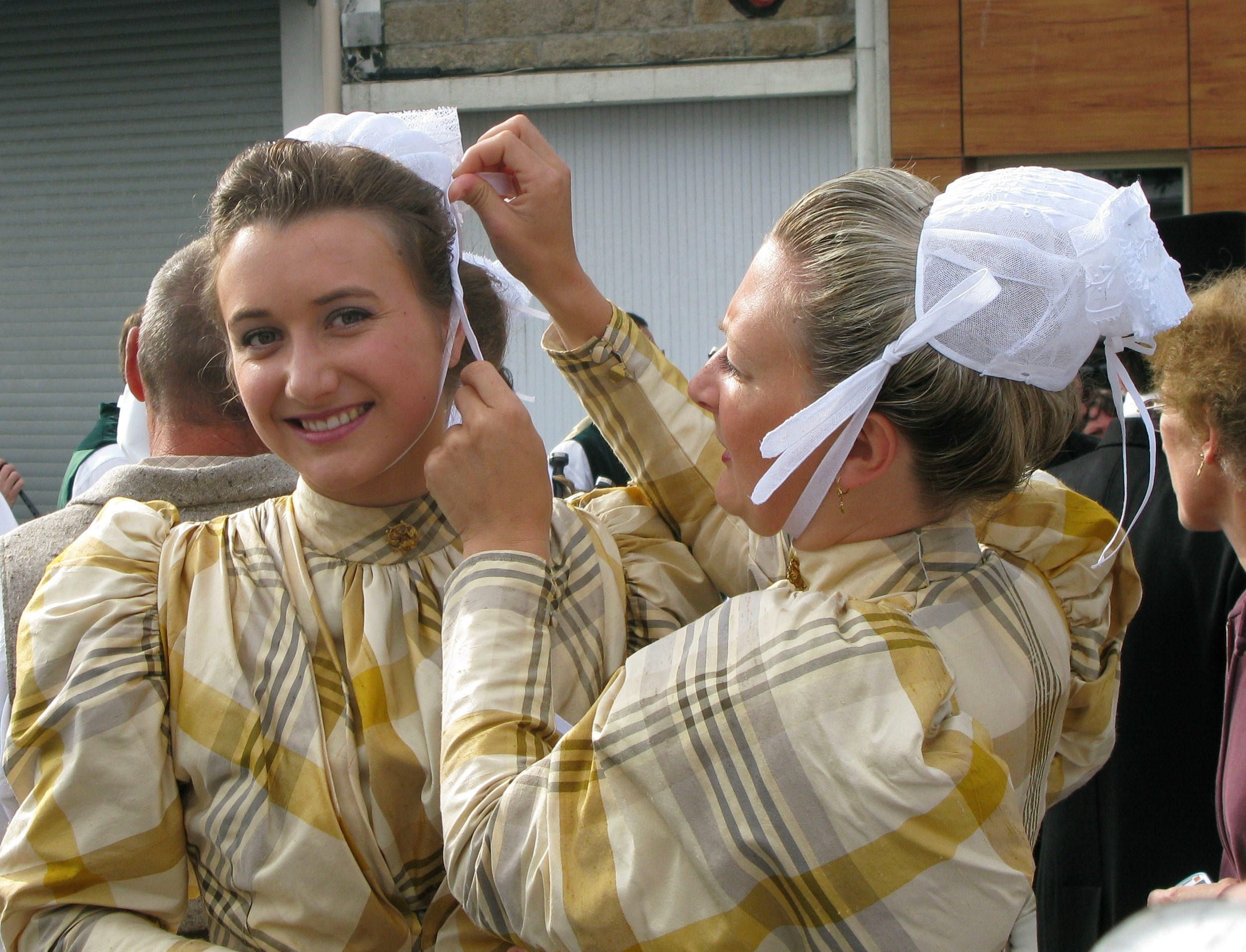 Coiffes bretonnes et détails de fixation, Festival Interceltique de Lorient 2009, France.